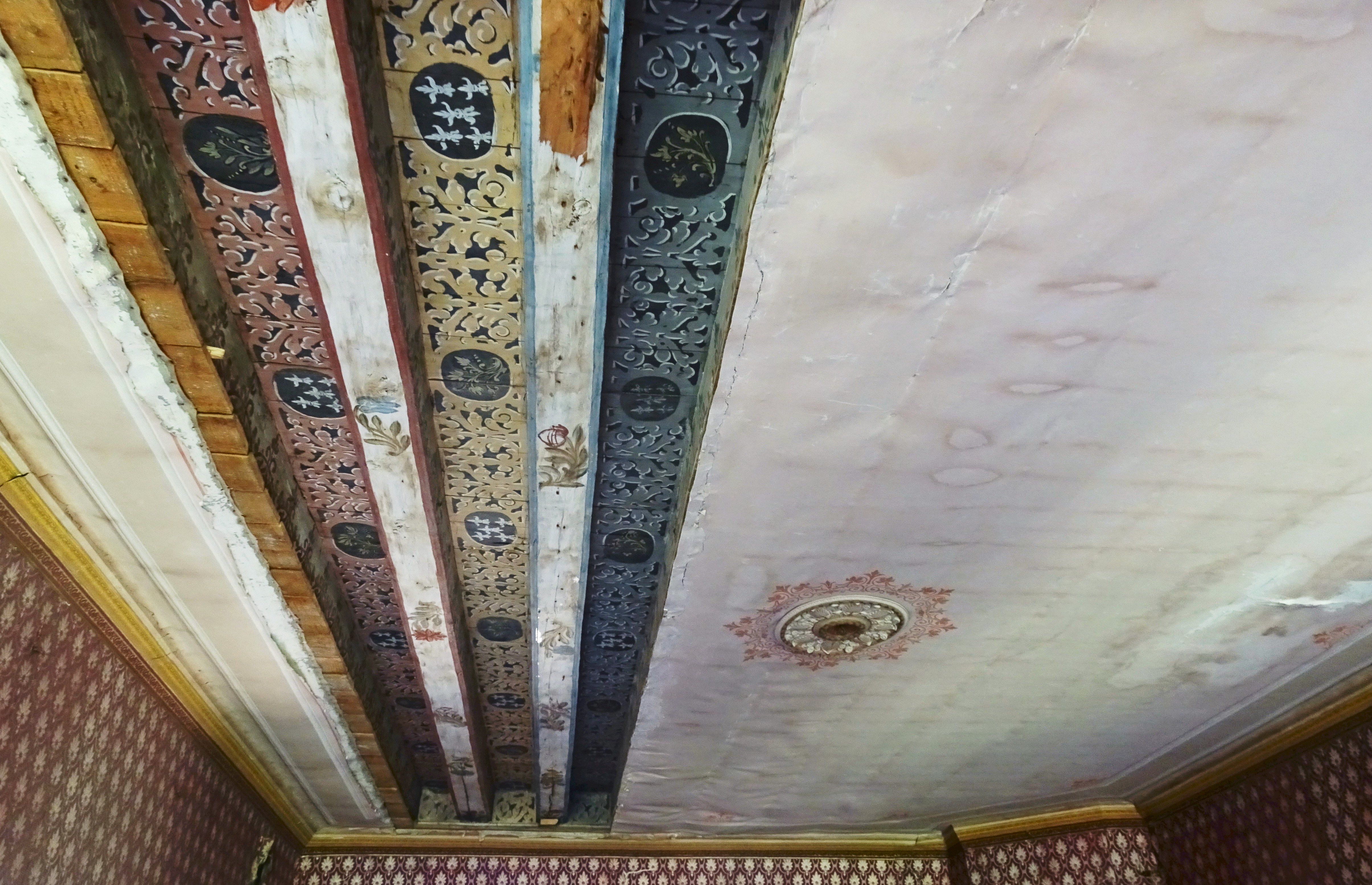 Bogesund interiör, nyligen frilagd takmålning